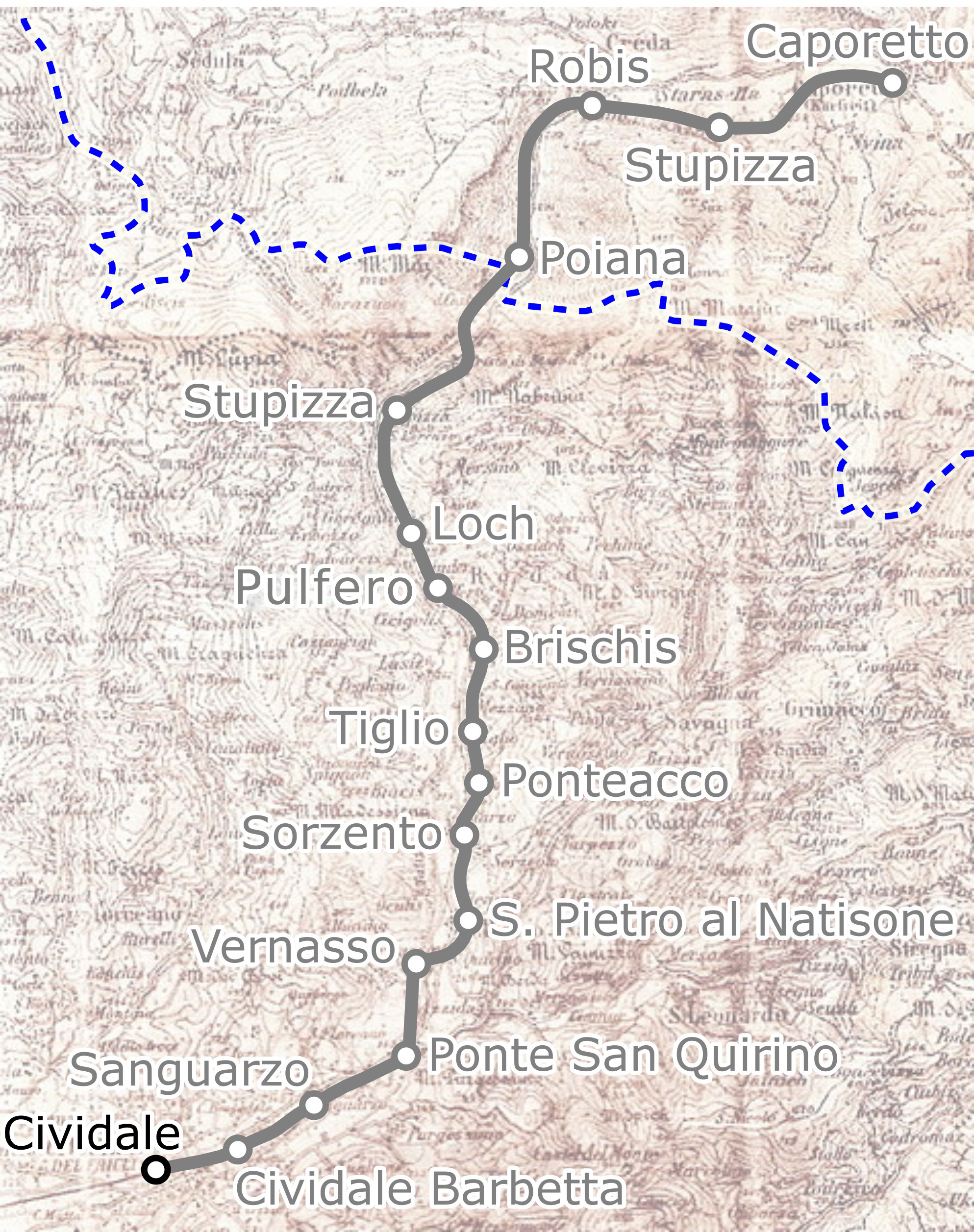 Percorso approssimativo della ferrovia Cividale-Caporetto eseguito su mappa del 1911